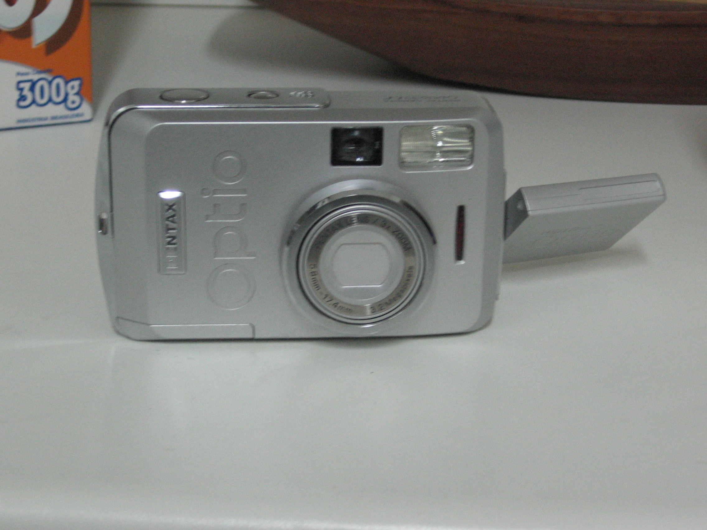 Pentax Optio 33LF Camera